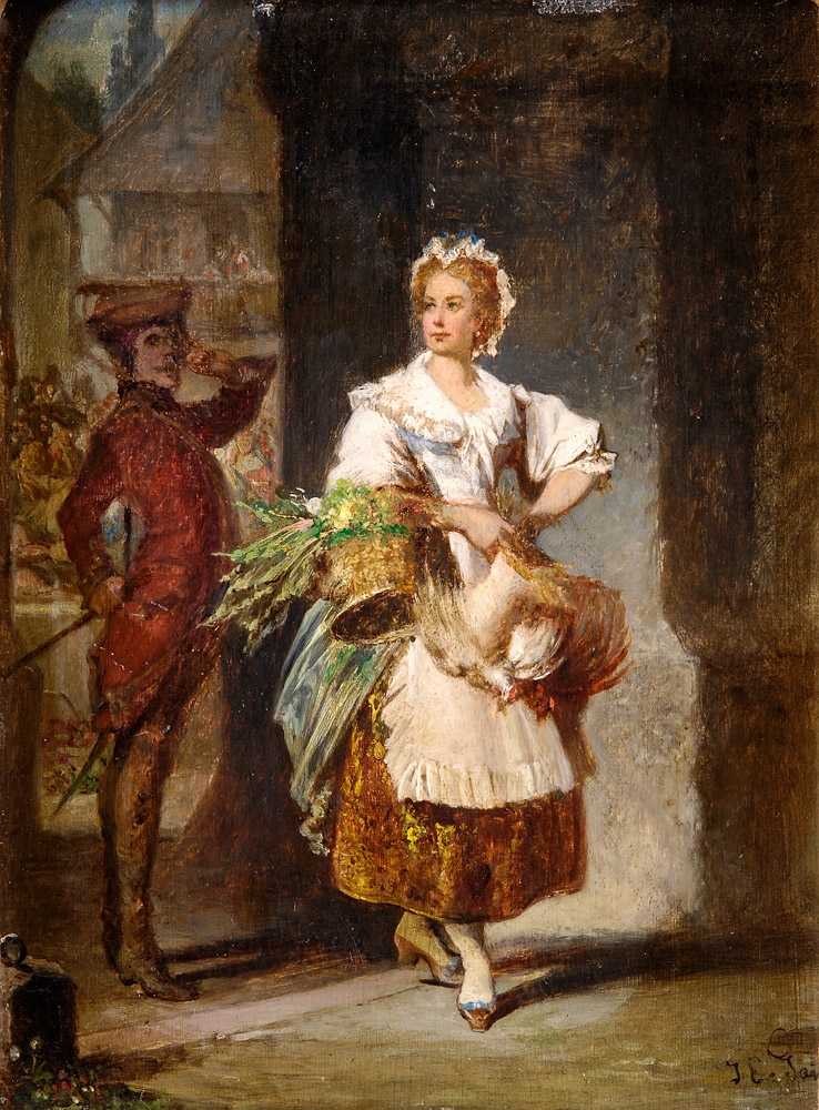 Die schöne Marketenderin. Öl auf Holz, 20 x 15 cm